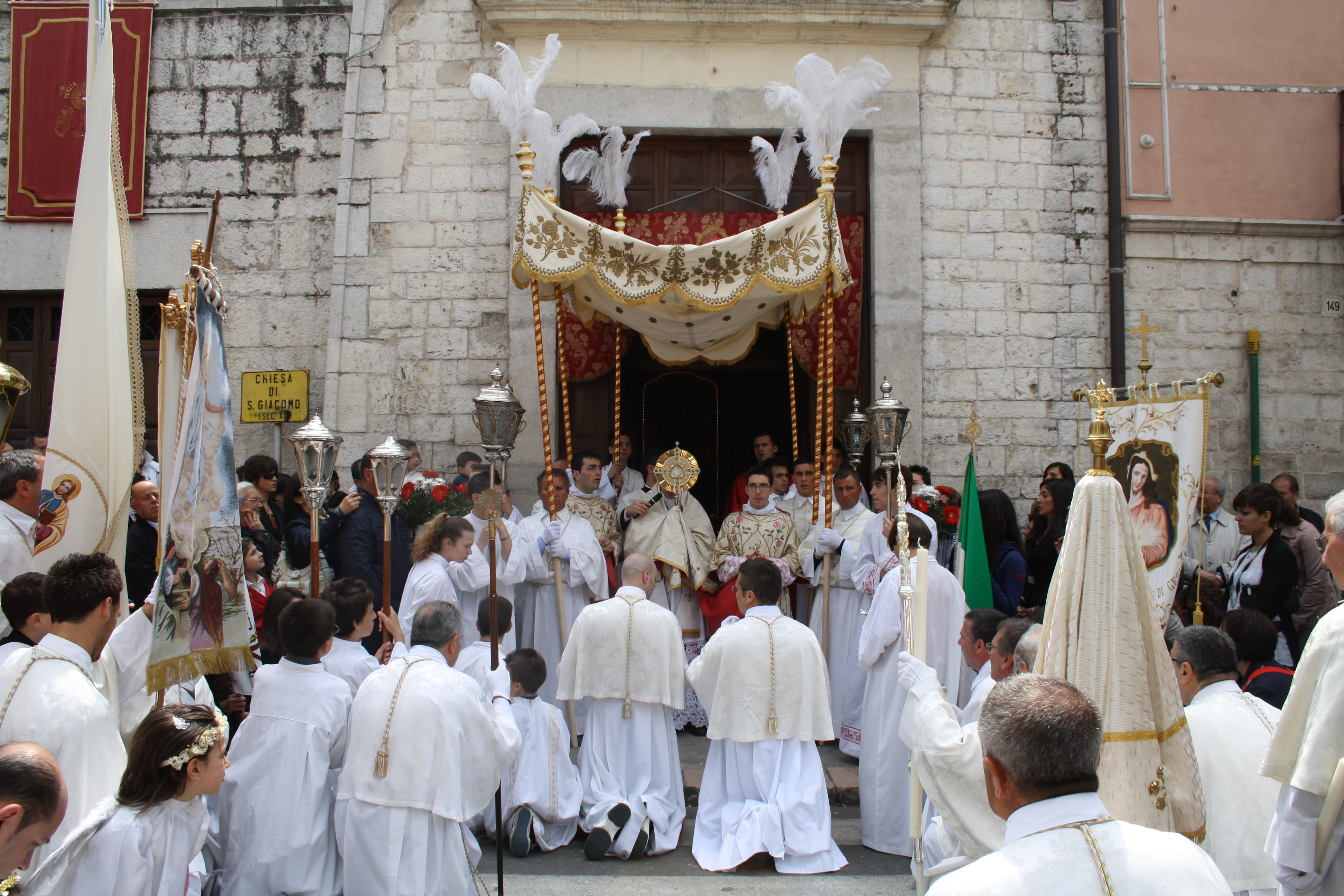 Processione eucaristica di Pasqua al rientro in San Giacomo (2011)